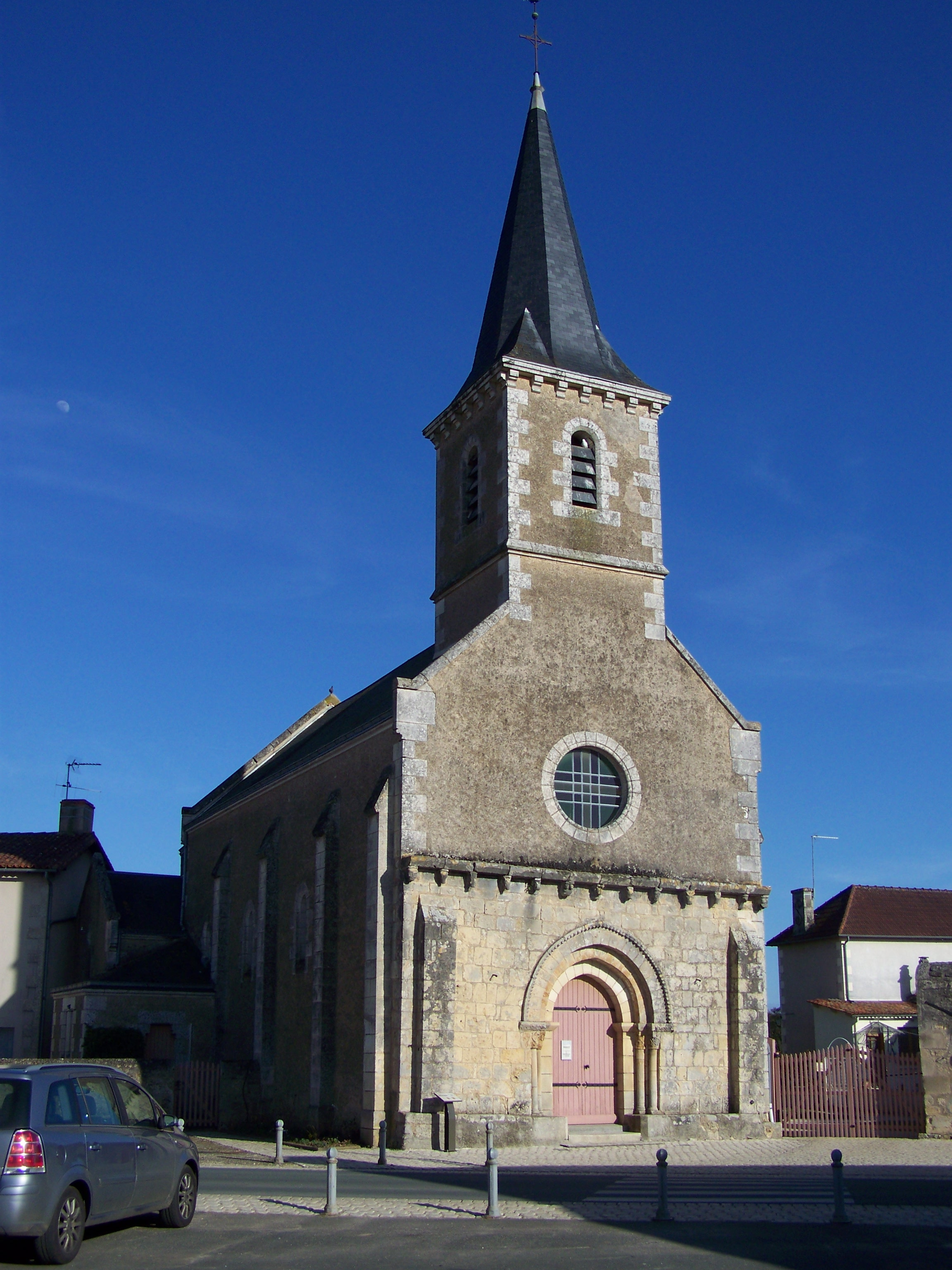 Église de la Ferrière-Airoux